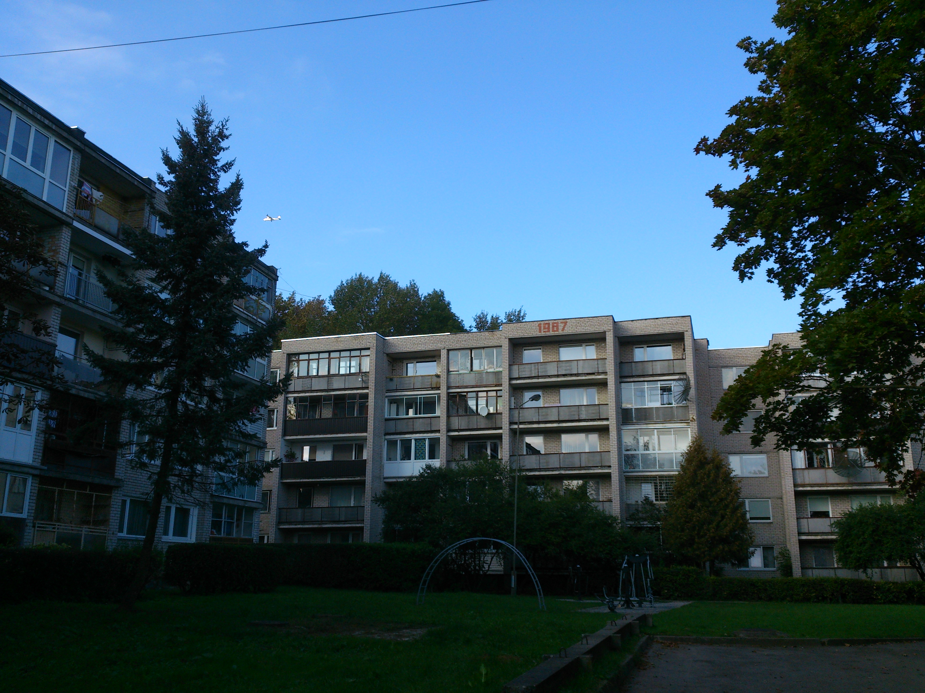 Aleksotas, Kaunas, Lithuania